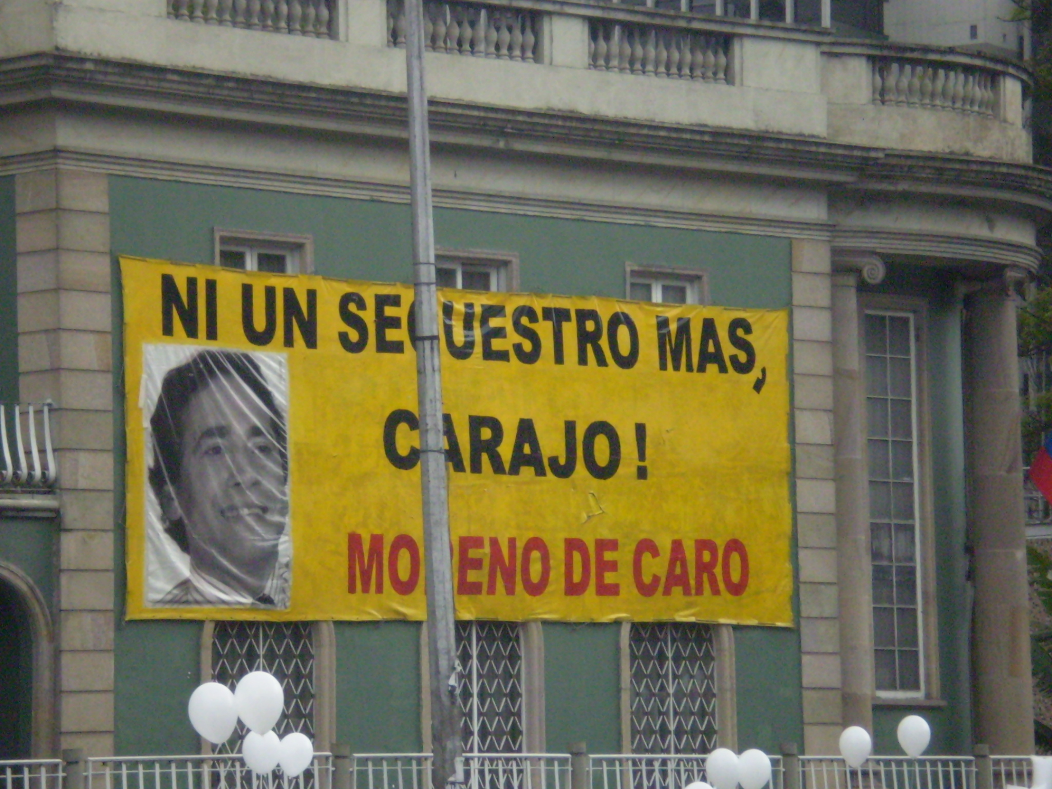 Marcha 20 de julio - pancarta Moreno de Caro. Por Julián Ortega Martínez / equinoXio